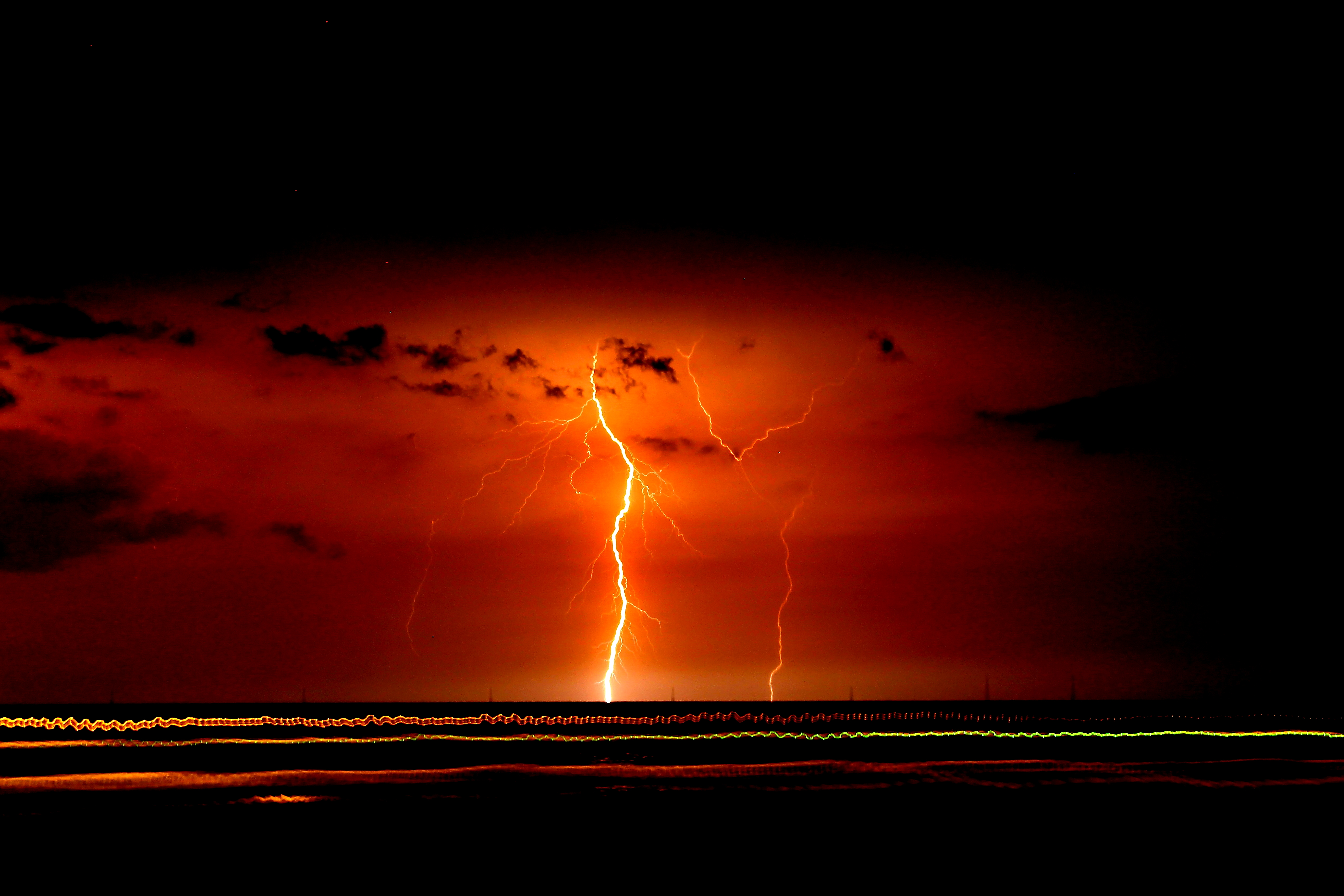 IMG 2172 "RELAMPAGO DEL CATATUMBO OBSERVADO DESDE EL BLOQUE 06 DEL LAGO DE MARACAIBO"